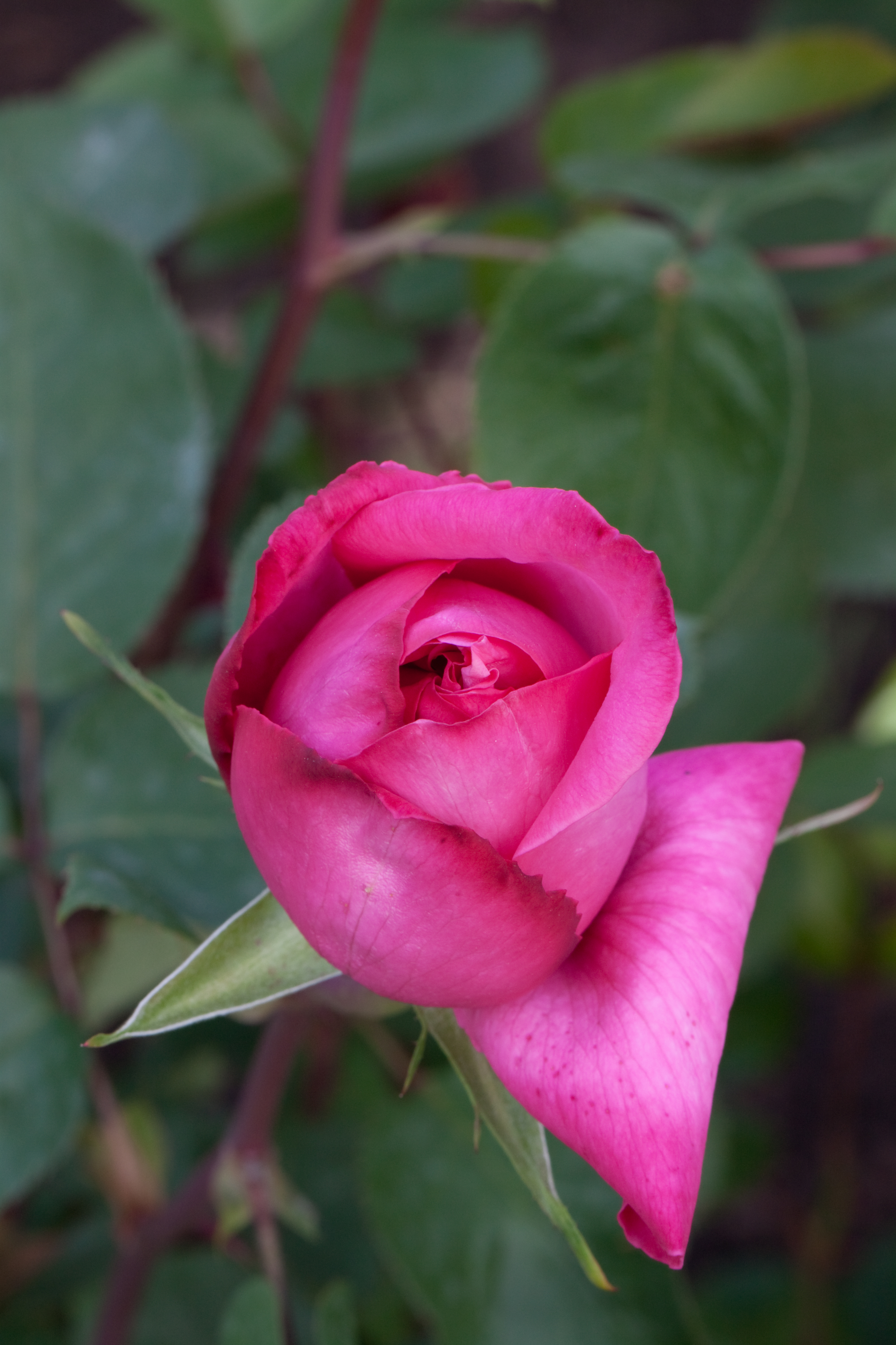 Montesquicu. モンテスキュー。